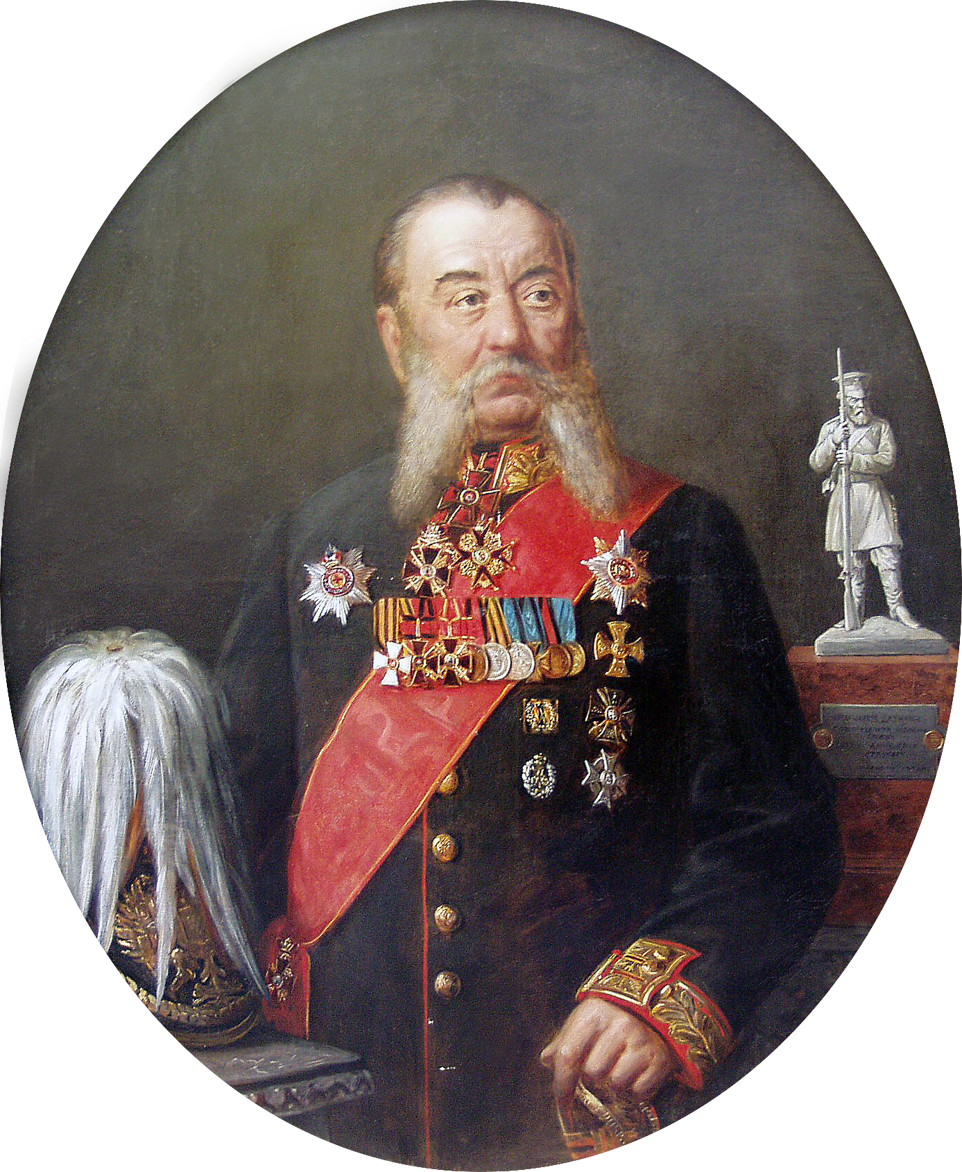 Сeremonial portrait of Katerynoslav nobility mareshal Petro Strukov